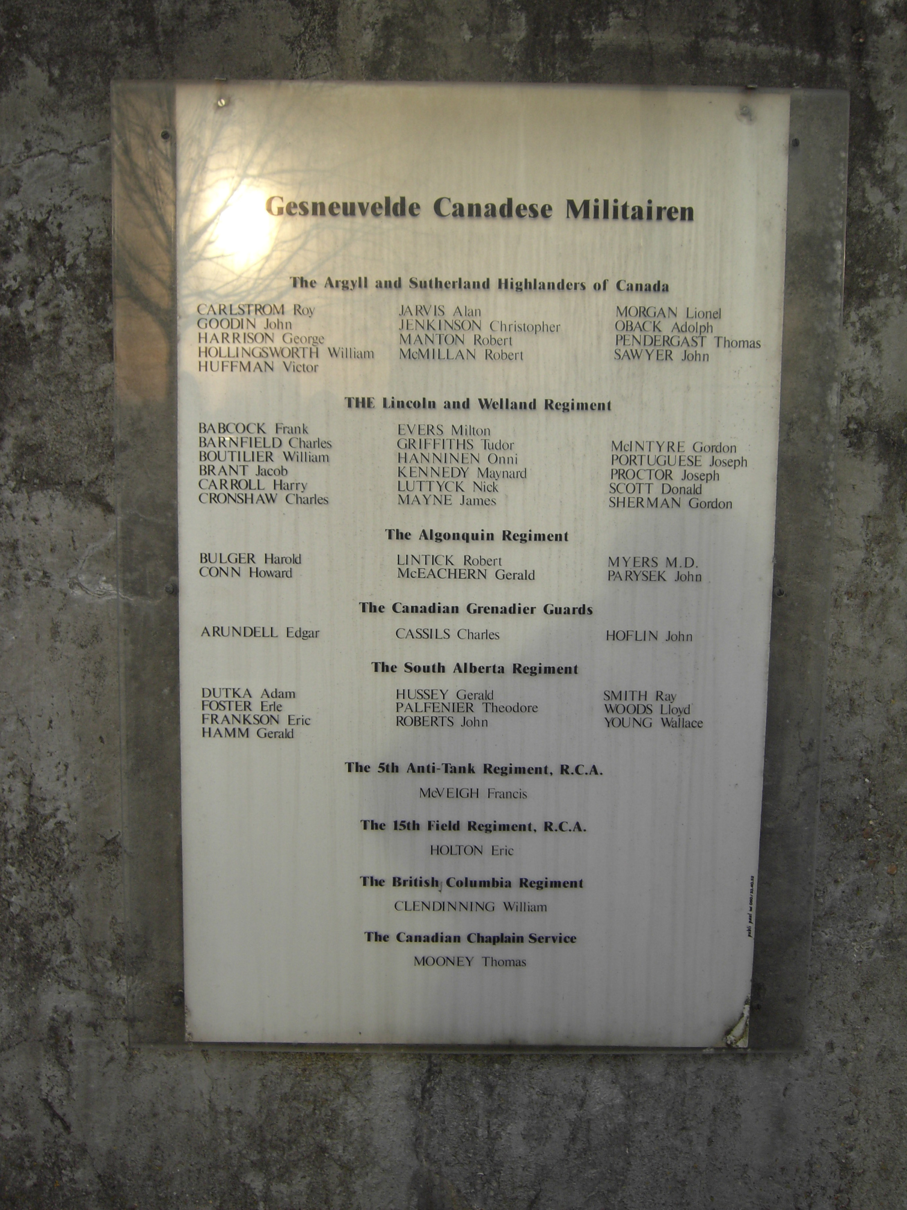 Moerbrugge (Oostkamp) - Belgium. Lijst van Canadese gesneuvelden in september 1944, aan de brug van Moerbrugge (Kanaal Gent-Brugge).